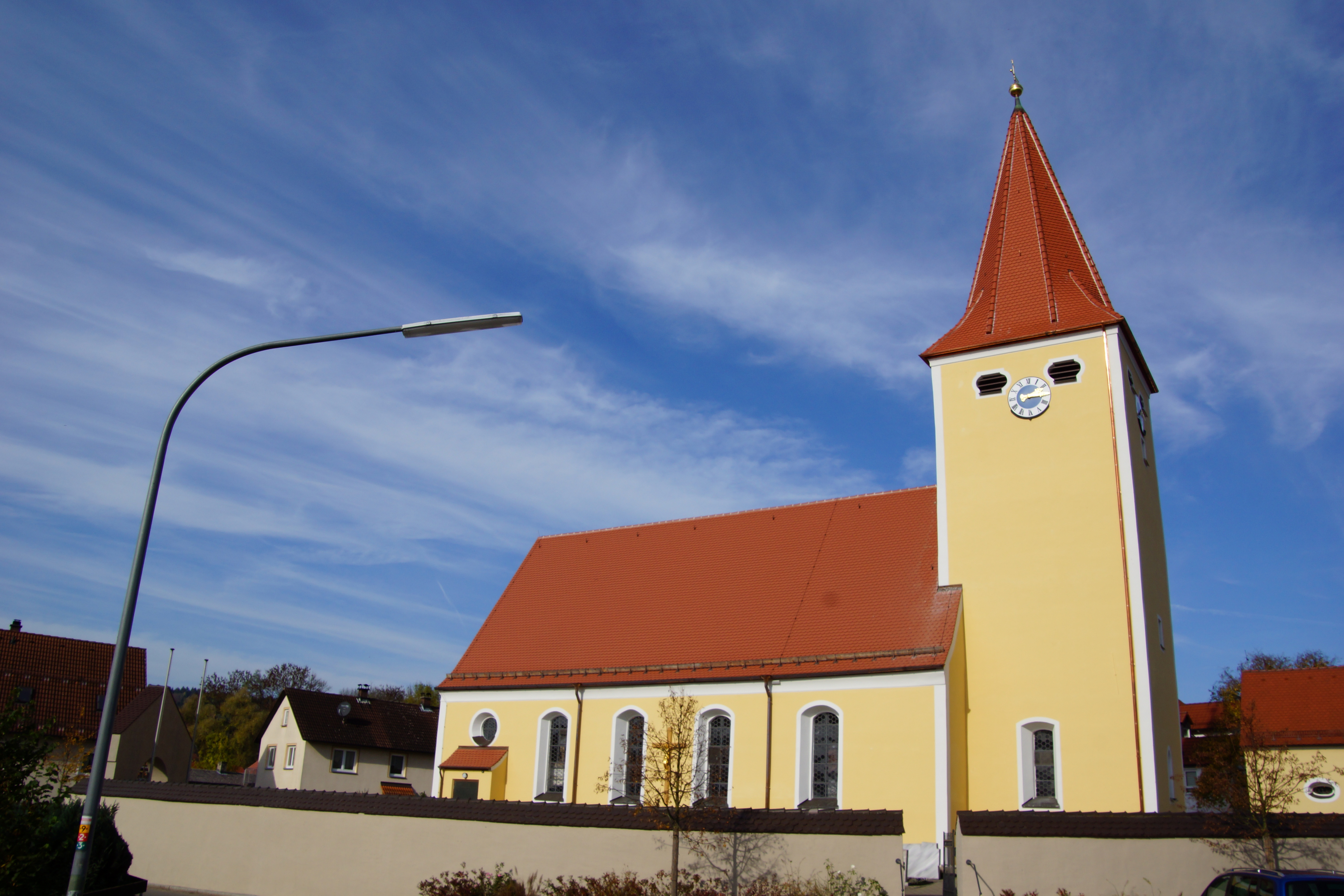 Die katholische Pfarrkirche St. Peter und Paul in Pilsach bei Neumarkt in der Oberpfalz